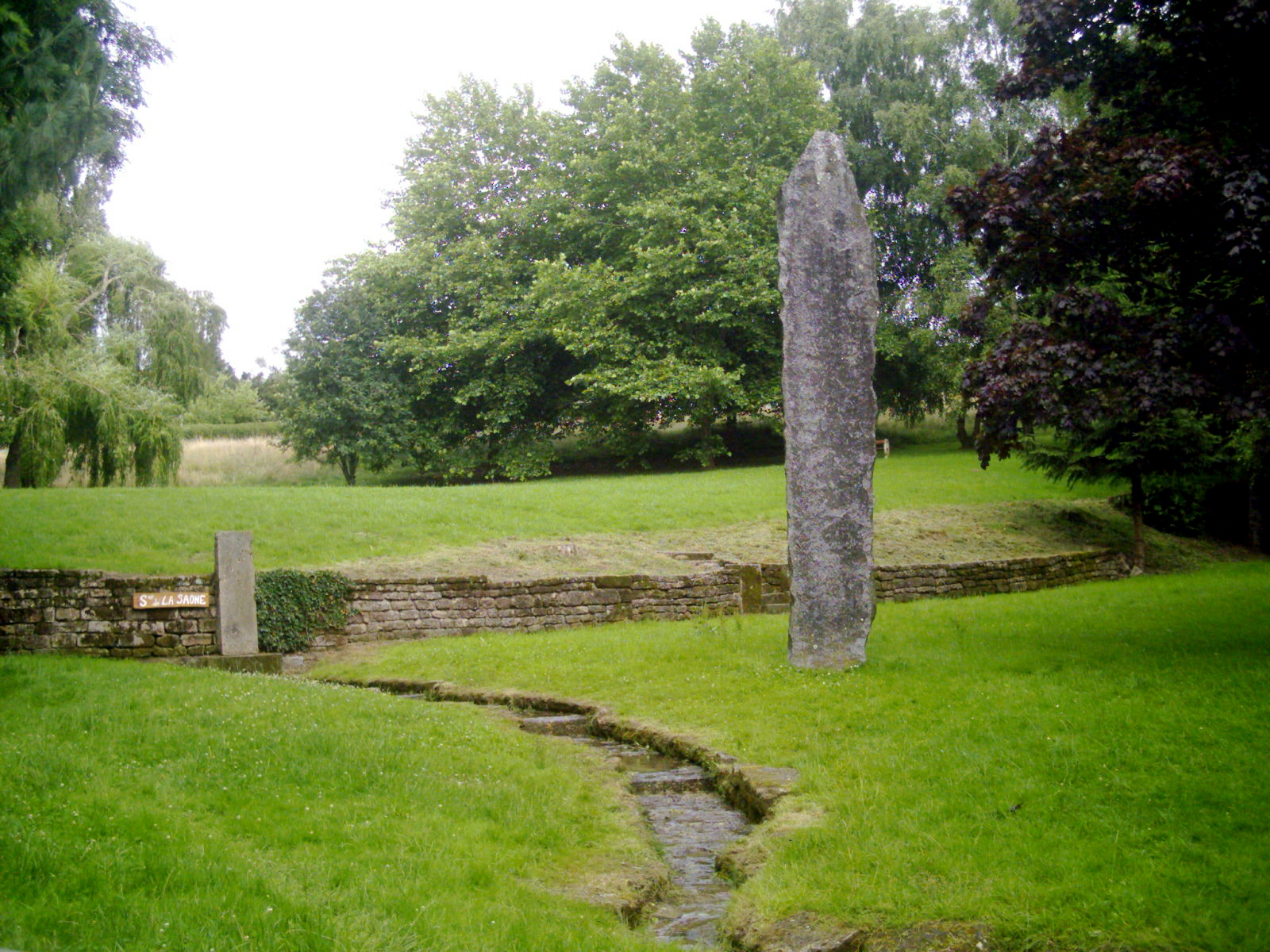 Source de la Saone à Vioménil